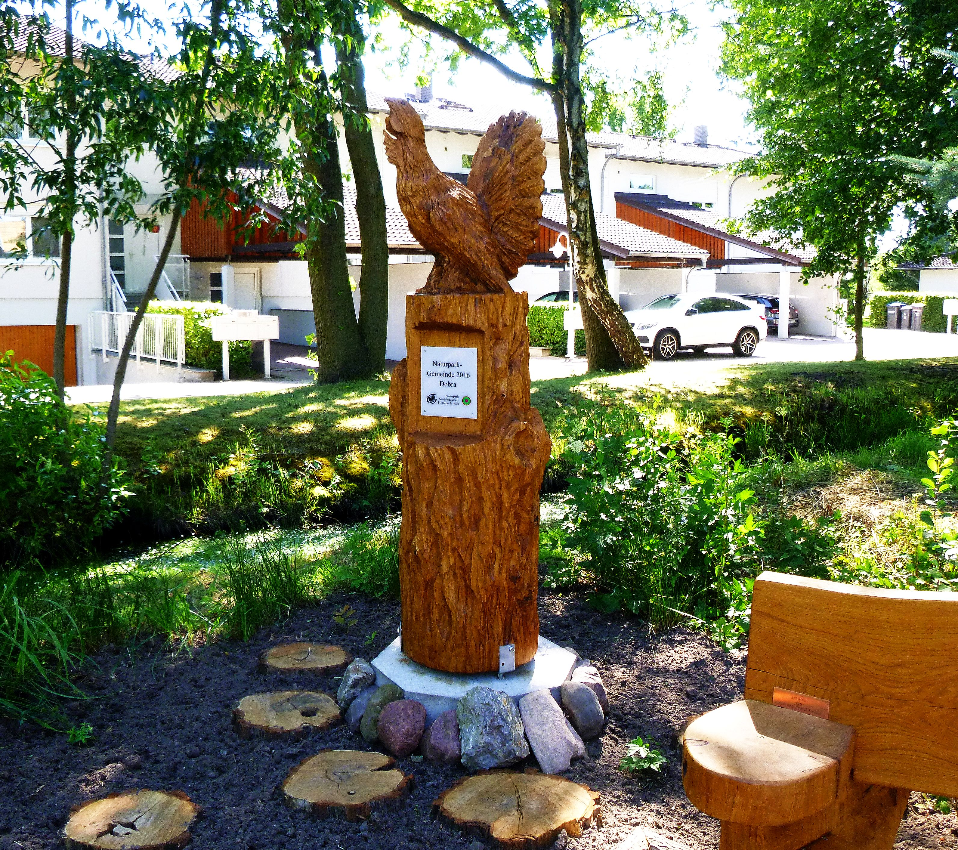 Erinnerungsstele Naturparkgemeinde 2016 in Dobra